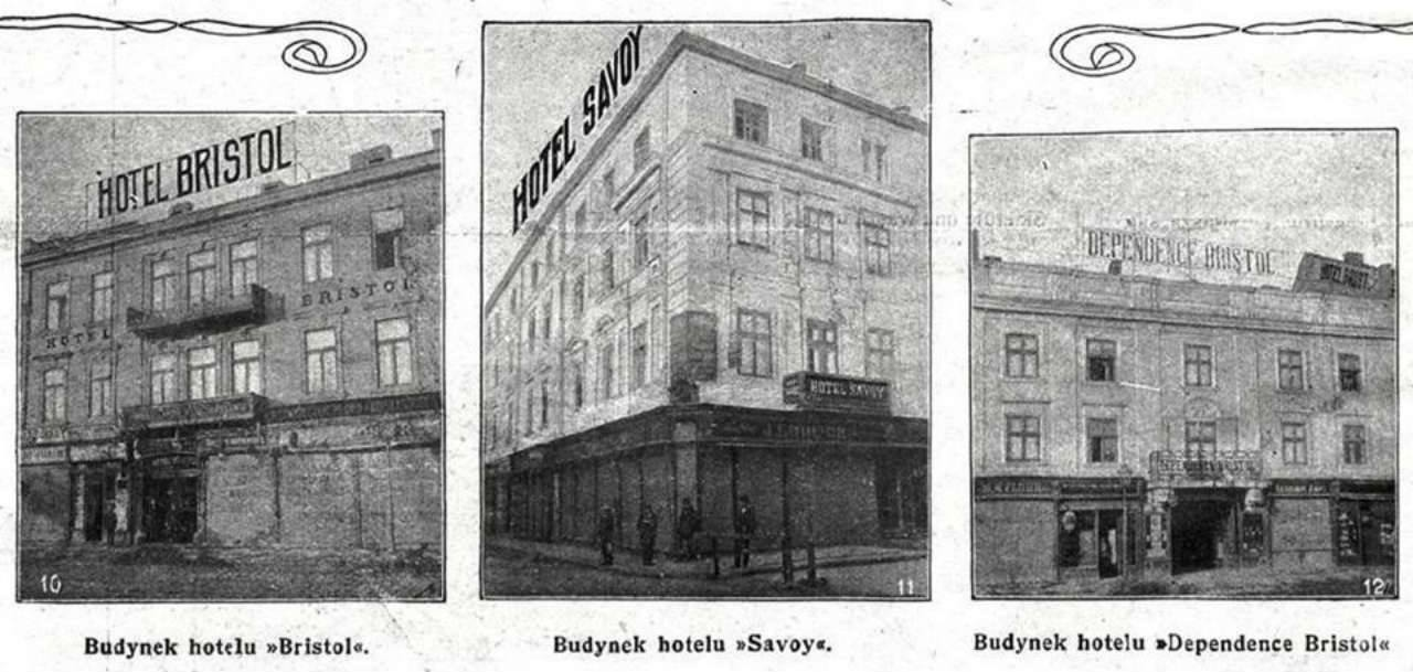 Львів